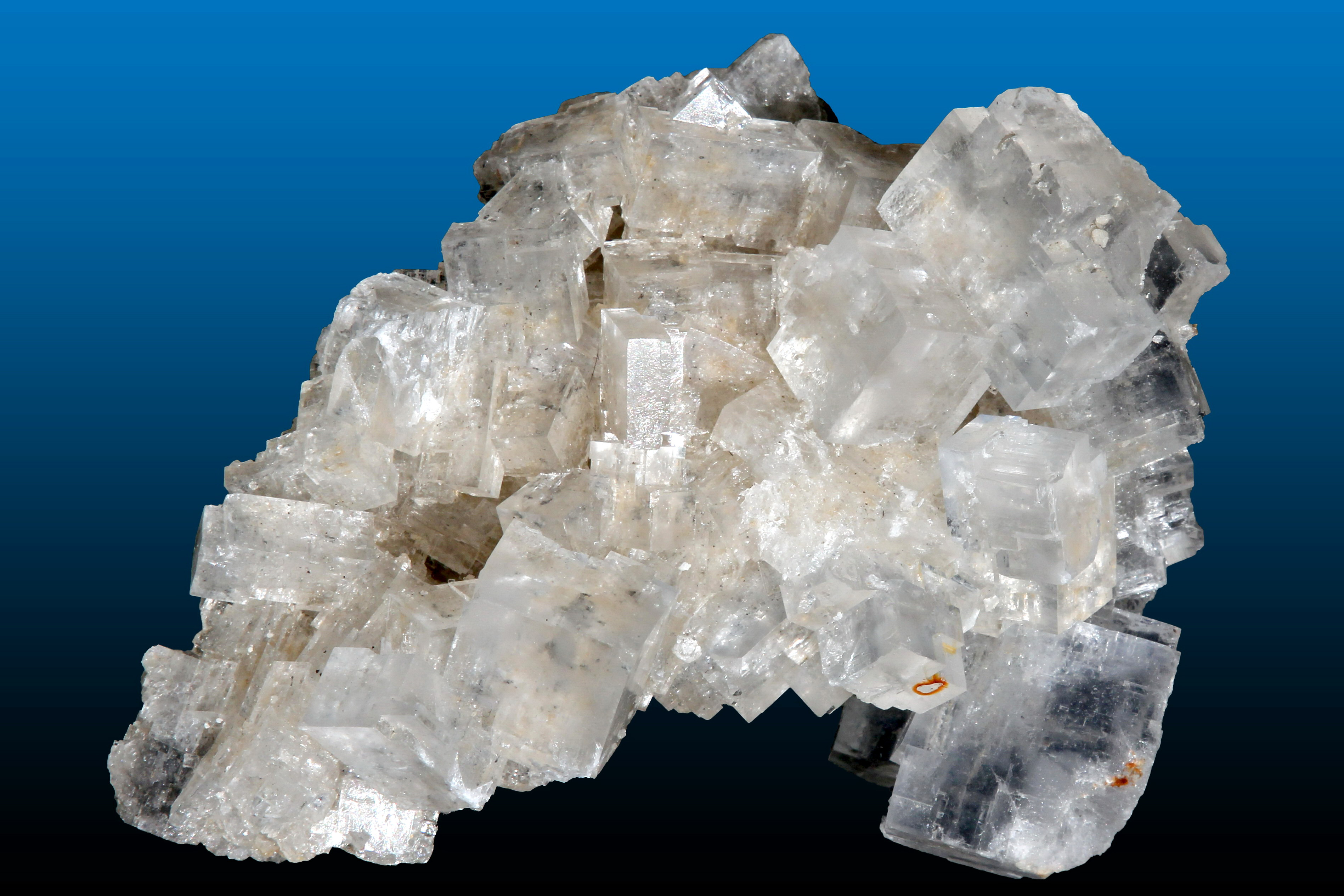 Halit (NaCl) - Kopalnia soli Wieliczka, Polska.